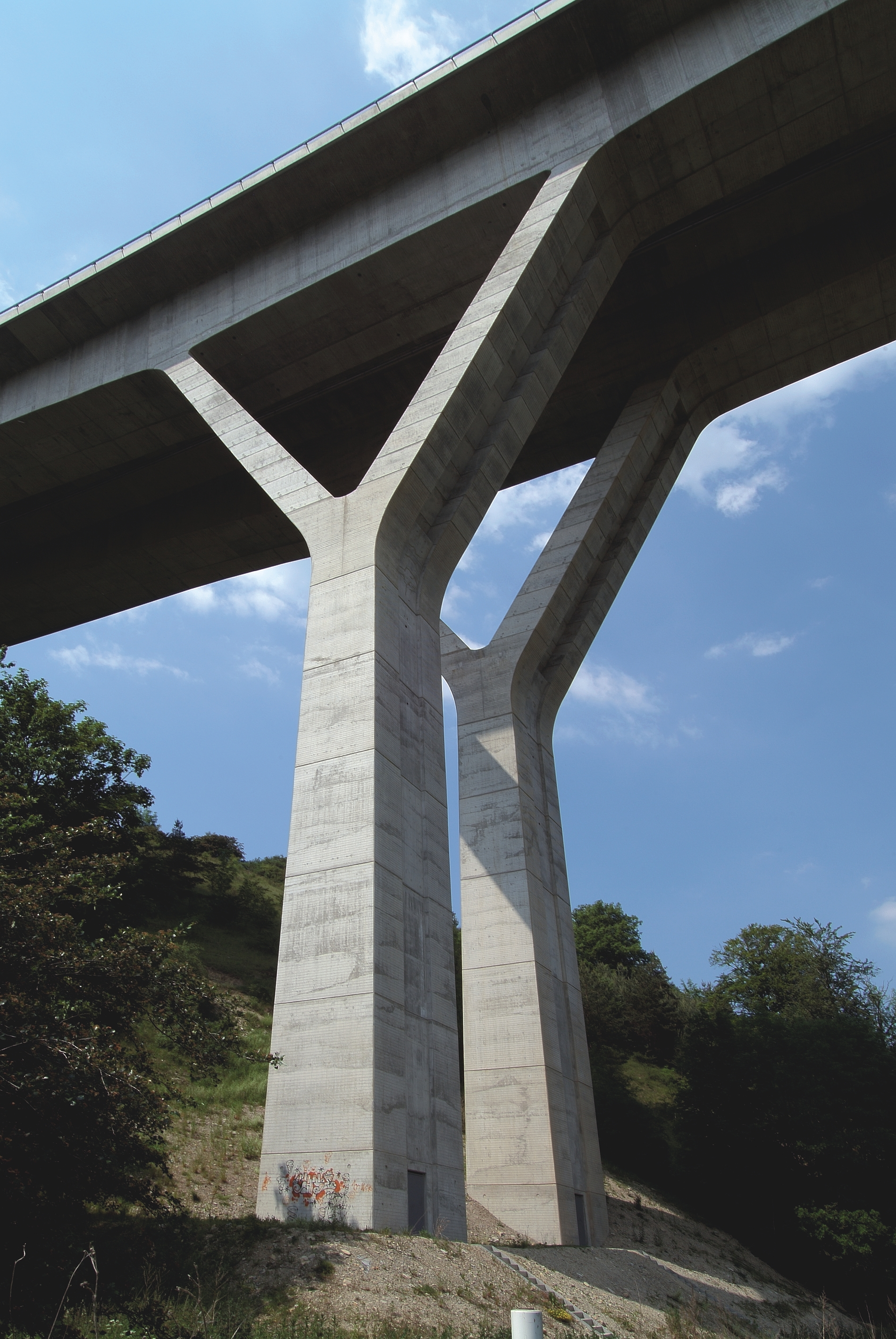 Talbrücke Zahme Gera, weltweit höchste Y-Pfeiler, geschalt mit NOE Schreitschalung